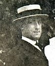 Jorge Astaburuaga Lyon nació en Santiago de Chile en 1880 y falleció en la misma ciudad el 17 de enero de 1974. Fue una intendente, diputado y corredor de la Bolsa de Comercio de Santiago.